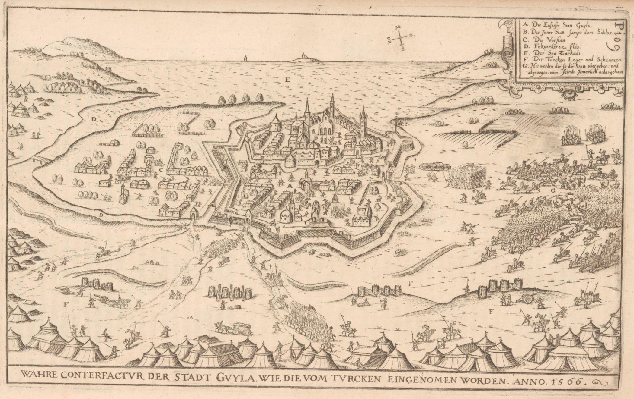 Szolnok ostroma 1566 Ortelius Redivivus Et Continuatus, Oder Der Ungarischen Kriegs-Empörungen Historische Beschreibung : Darinnen enthalten Alles, was sich bey vorgenommenen Belåger- und Eroberungen der Stätte ... In Ober- und Nider-Ungarn Wie auch Siebenbürgen Von dem 1395. biß in das 1607. Jahr ... denckwürdig zugetragen ...